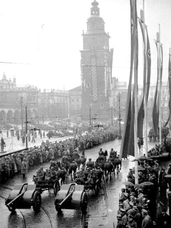 Krakau, Parade von SS und Polizei Scherl Bilderdienst: Jahresfeier im Generalgouvernement. In Anwesenheit mehrerer Reichsminister und Reichsleiter sowie zahlreiche anderer führender Persönlichkeiten aus Staat, Partei und Wehrmacht fand am Sonnabend [den 25.10. 1940] in Krakau die Feier des einjährigen Bestehens des Generalgouvernements statt. U.B.z. Die Parade von SS und Polizei vor dem Generalgouverneur auf dem Adolf-Hitler-Platz in Krakau. Fot.: Ho. 26.10.40 9310-40 Information added by Wikimedia users.